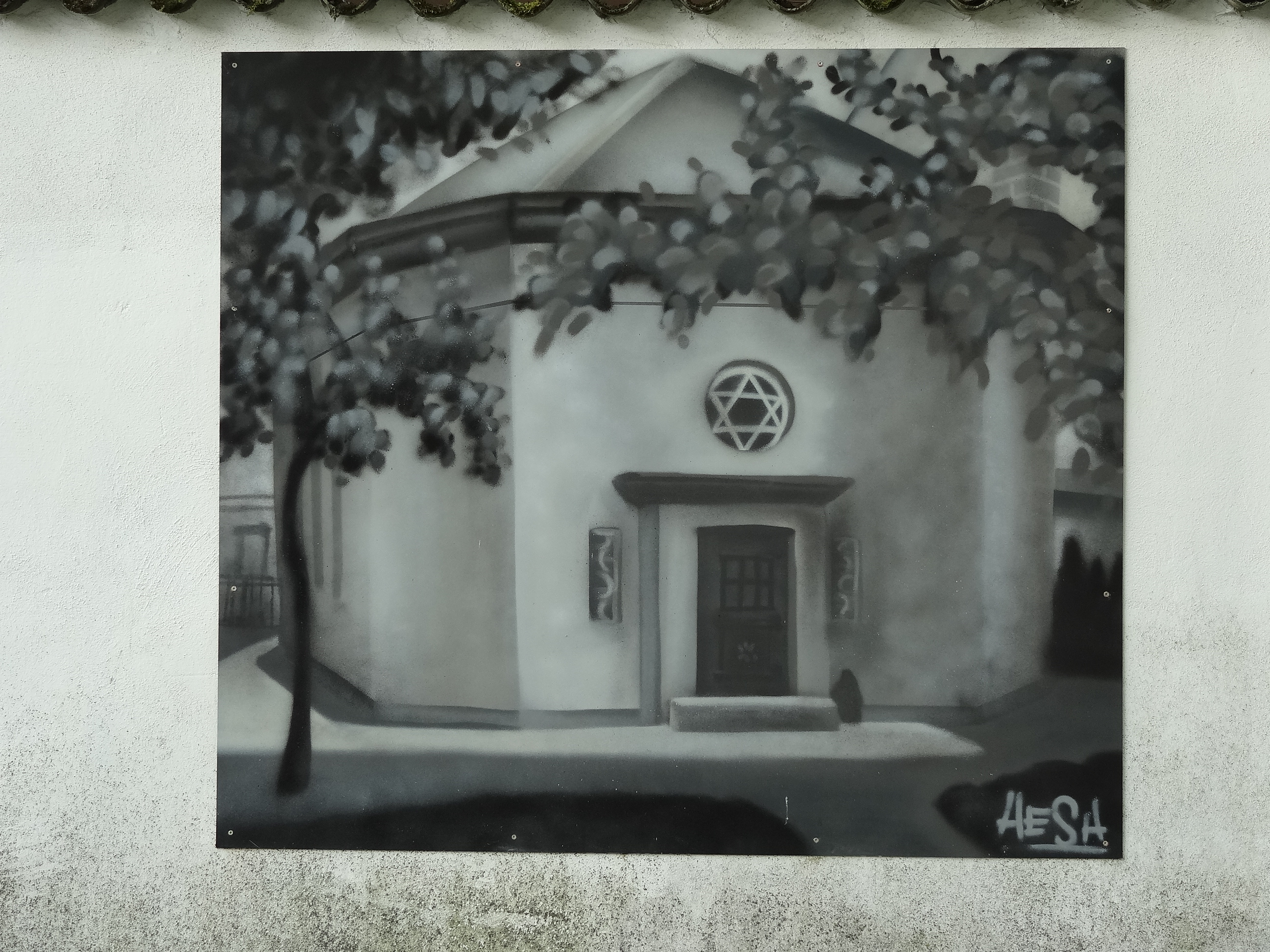 Synagogenplatz (Butzbach)